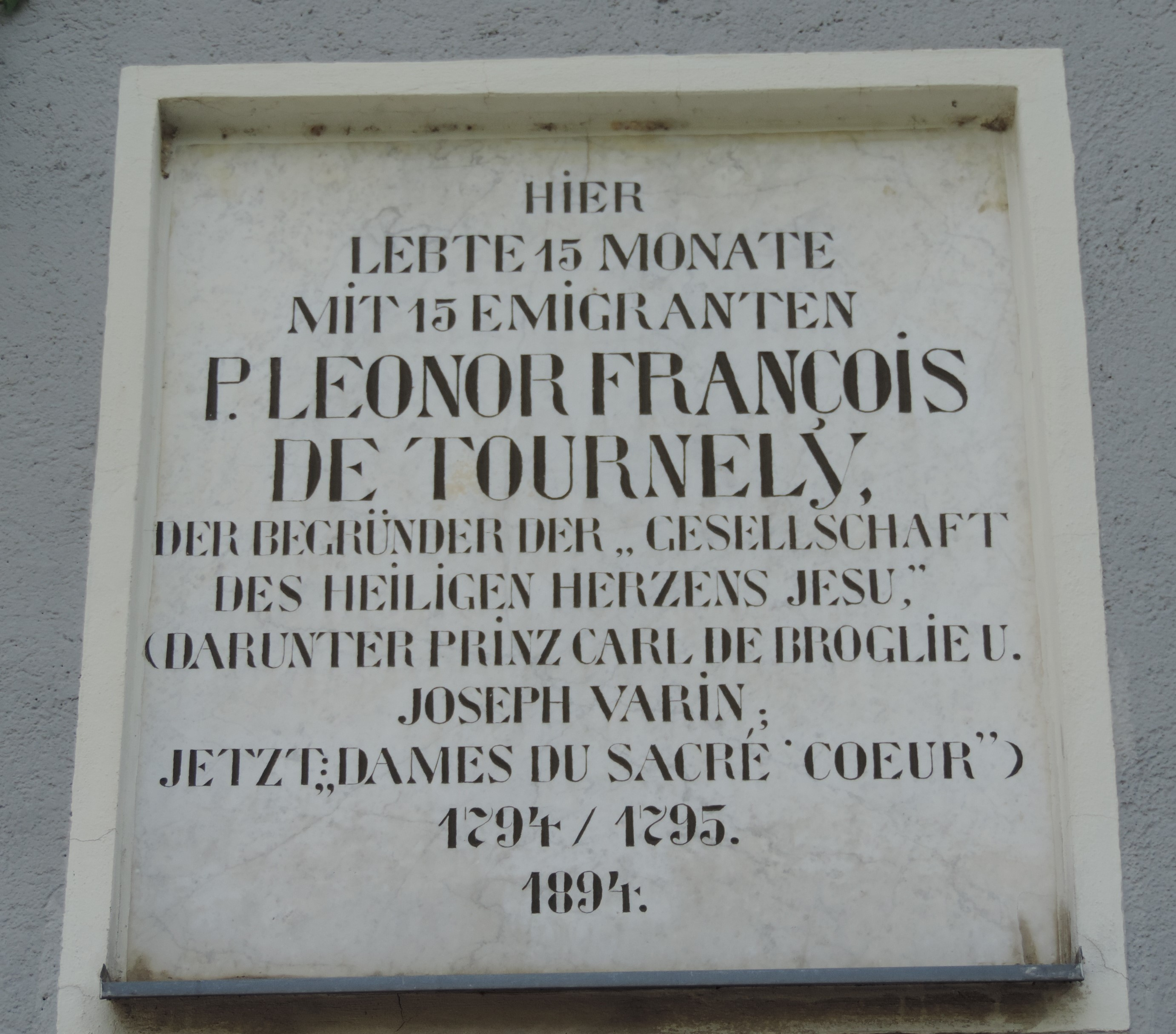 Tafel zur Erinnerung an Pater Tournèly